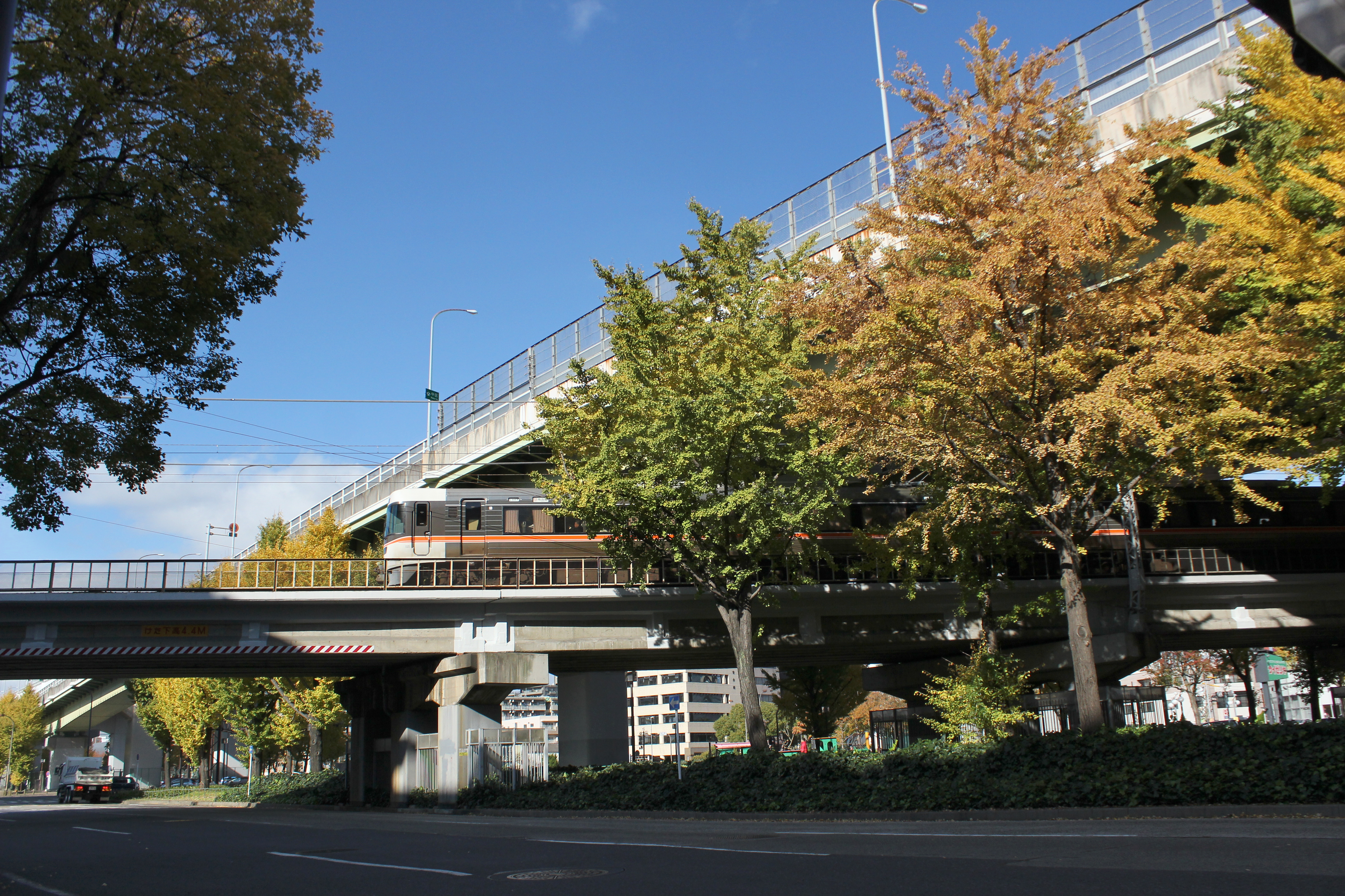 名古屋高速2号東山線 JR中央線との交差部